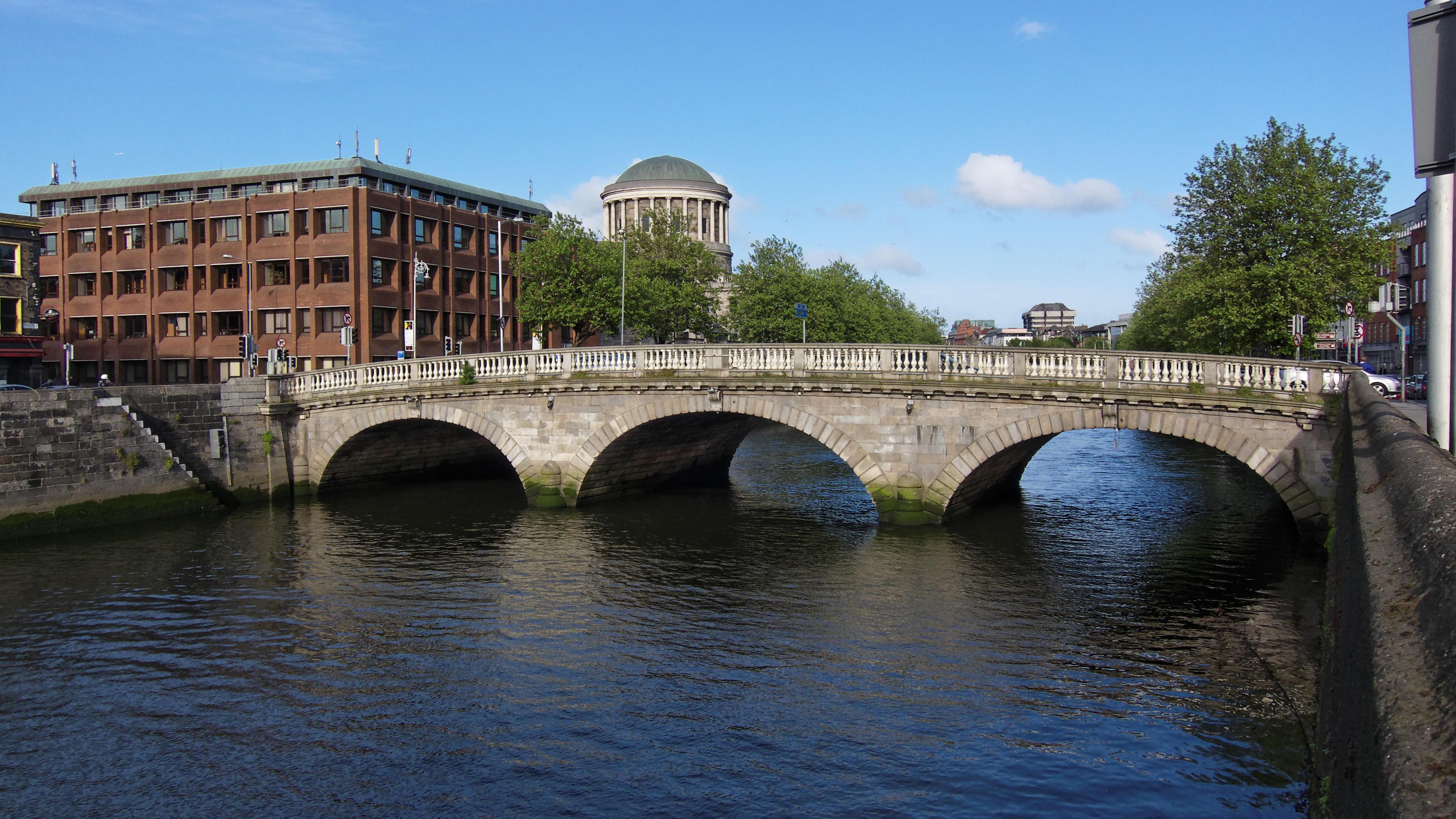 Puente Father Mathew. Dublín, Irlanda.